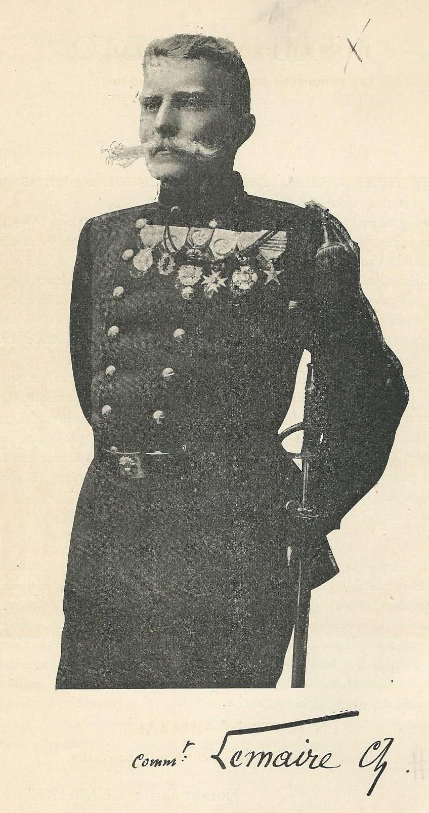 Charles Lemaire (1863-1926)